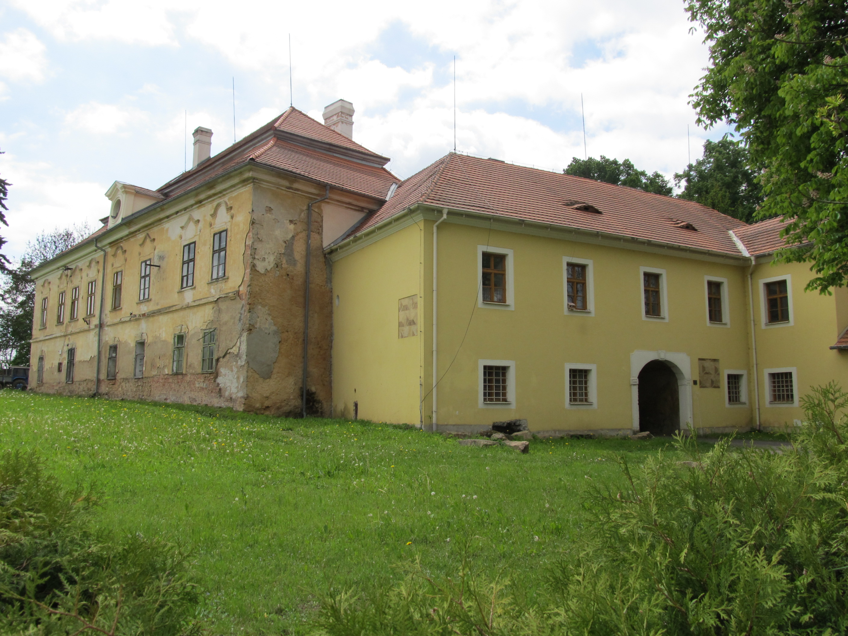 Ptenín - zámek